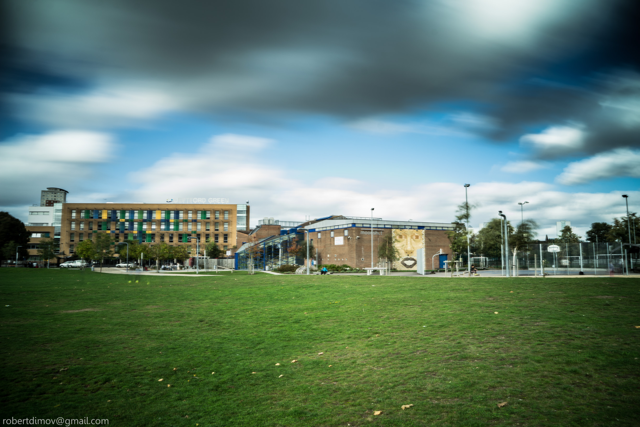 Deptford Green School